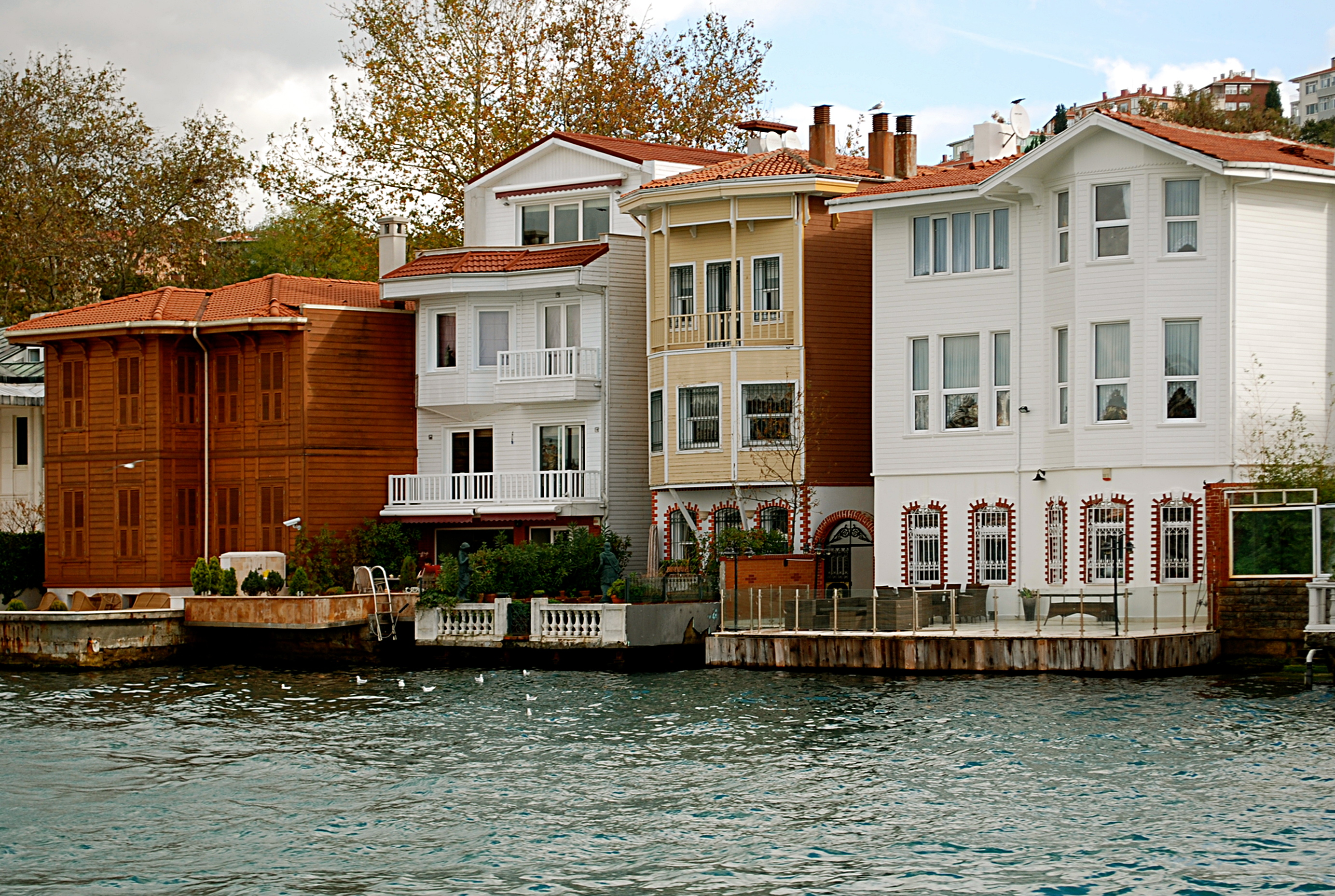 Seaside house in Kanlıca, Beykoz (Istanbul).